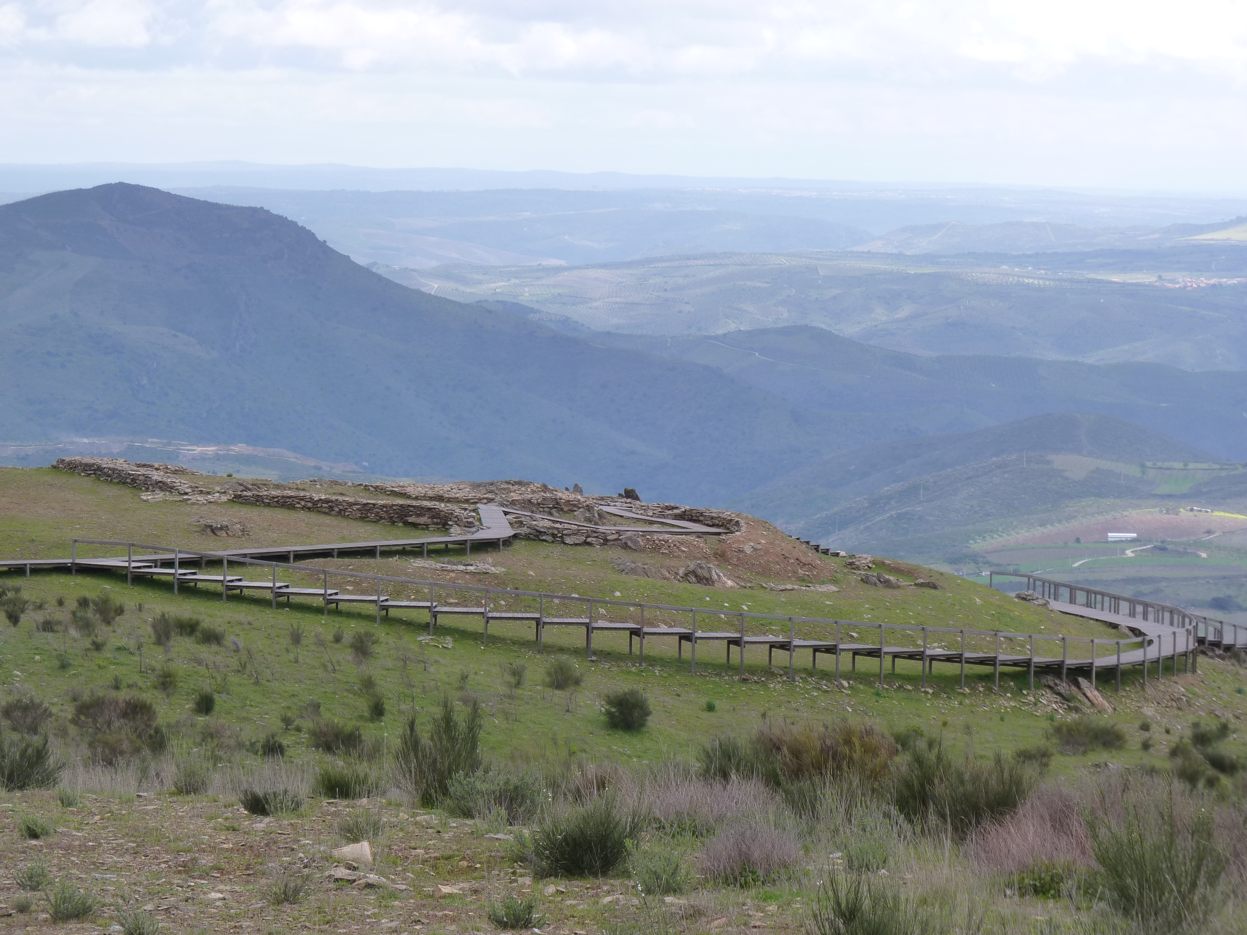 Castelo Velho de Freixo de Numão This file was uploaded for Wiki Loves Monuments in Portugal with the unique identifier 323273.